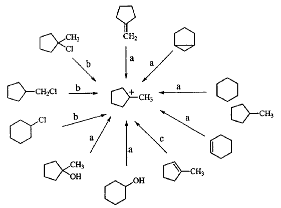 Gril